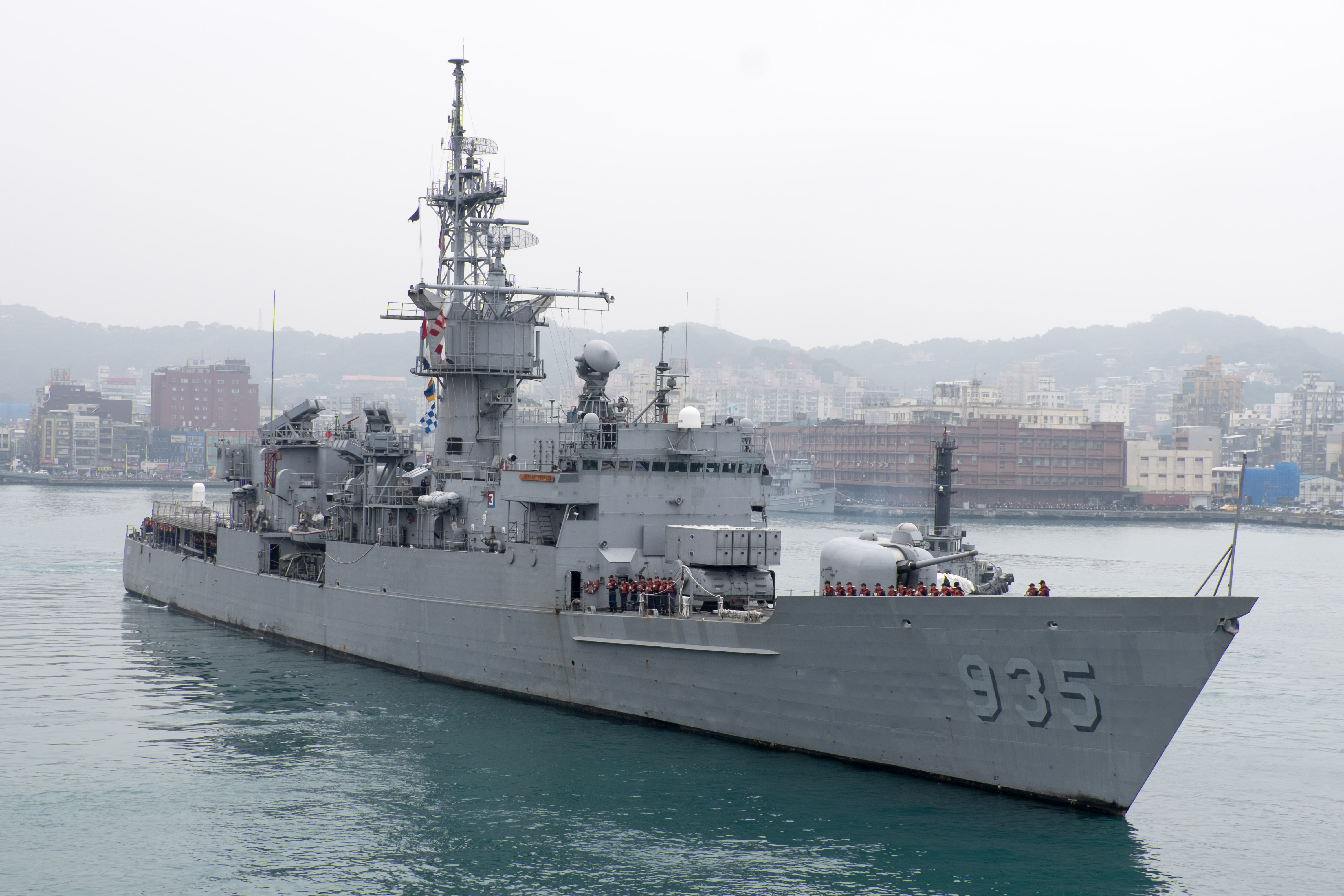 基隆港出港中的中華民國海軍巡防艦蘭陽（FFG-935）。